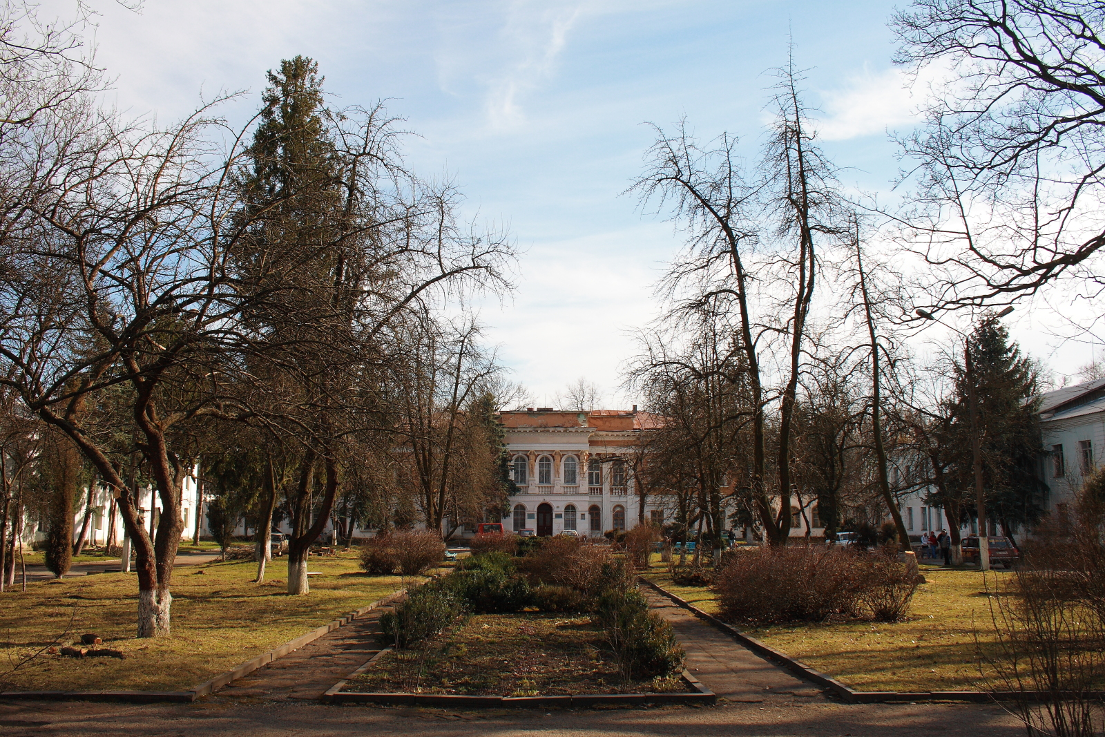 Микулинці